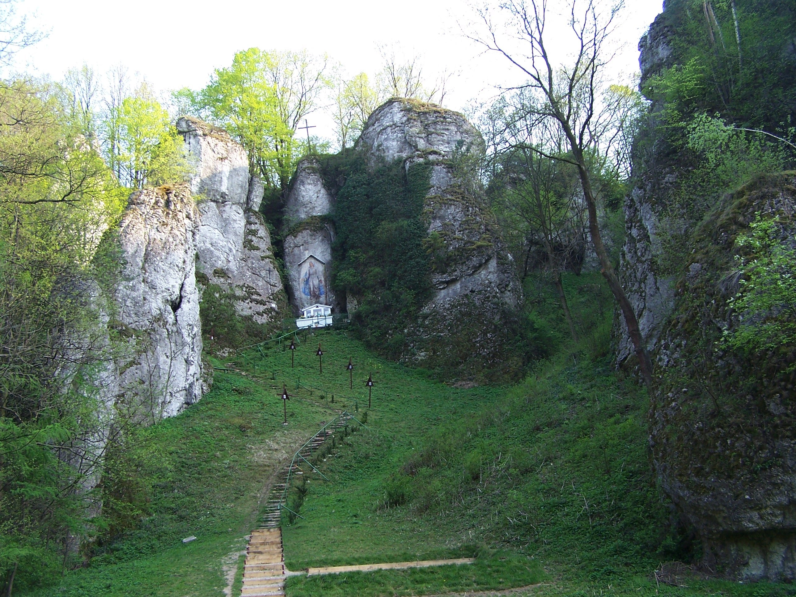 Dolina Mnikowska (Wyżyna Krakowsko-Częstochowska)